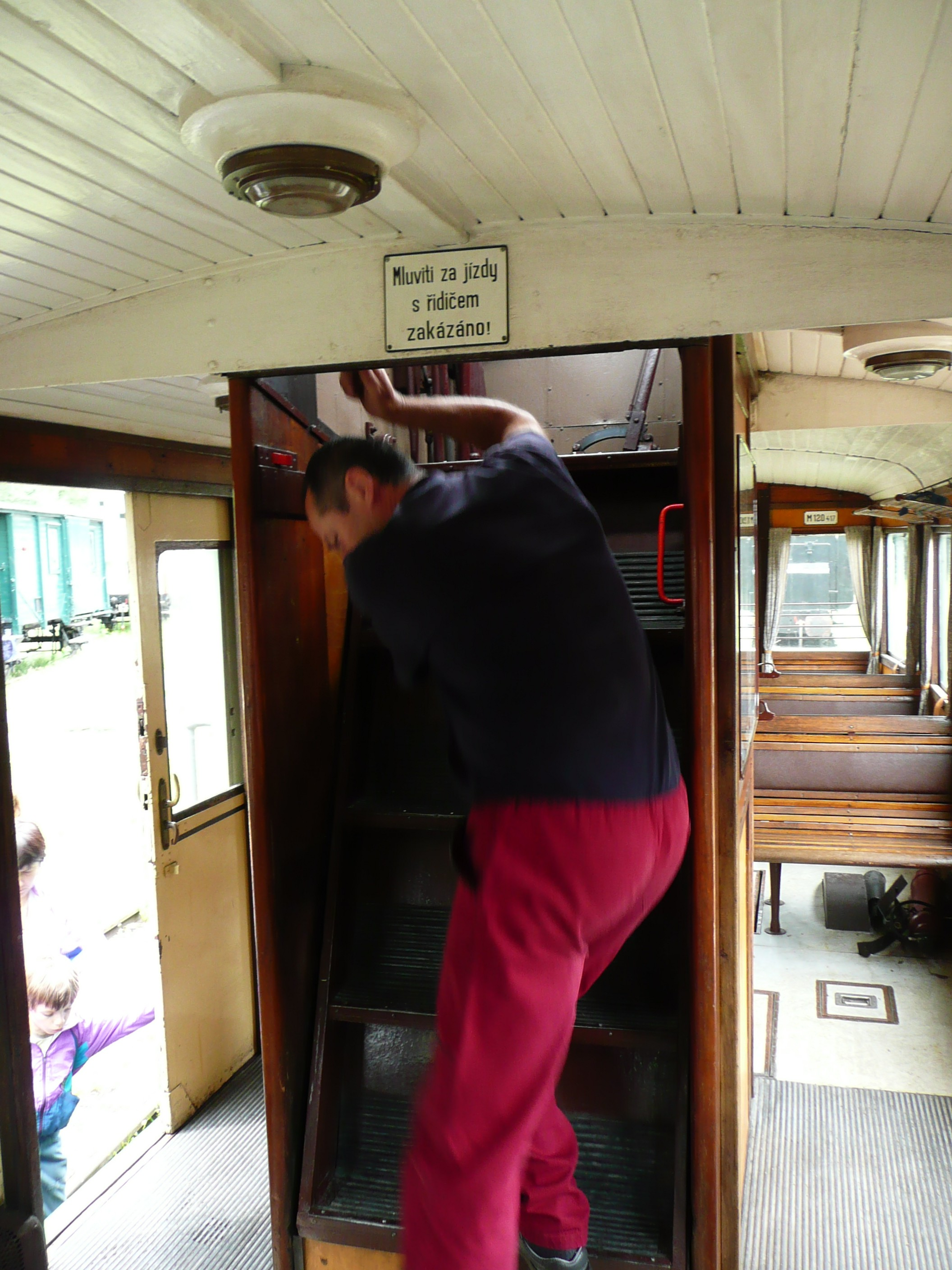 Der Lokführer verläßt den Führerstand des Turmtriebwagens M 120.417 im Technischen Nationalmuseum in Prag